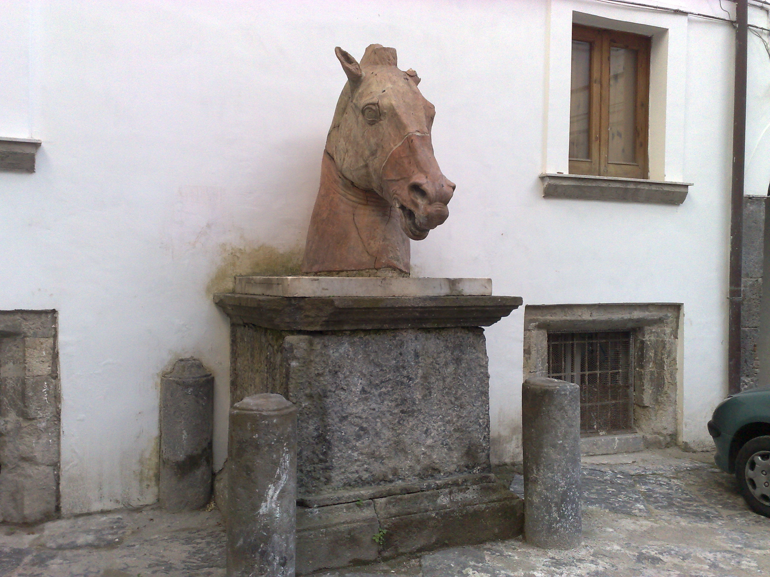 Scultura della testa di cavallo posta nel cortile interno del palazzo Diomede Carafa (Napoli)